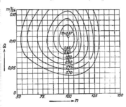 Bánki-turbina hatásfokdiagramja (kagylódiagram)